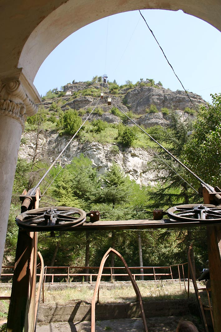 ჭიათურა = Tschiatura - Pendelseilbahn, Umlenkrollen